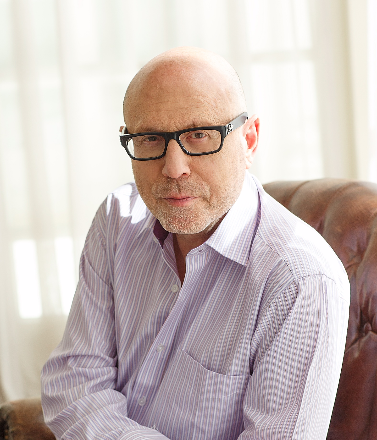 יעקב ויינשטיין 2017